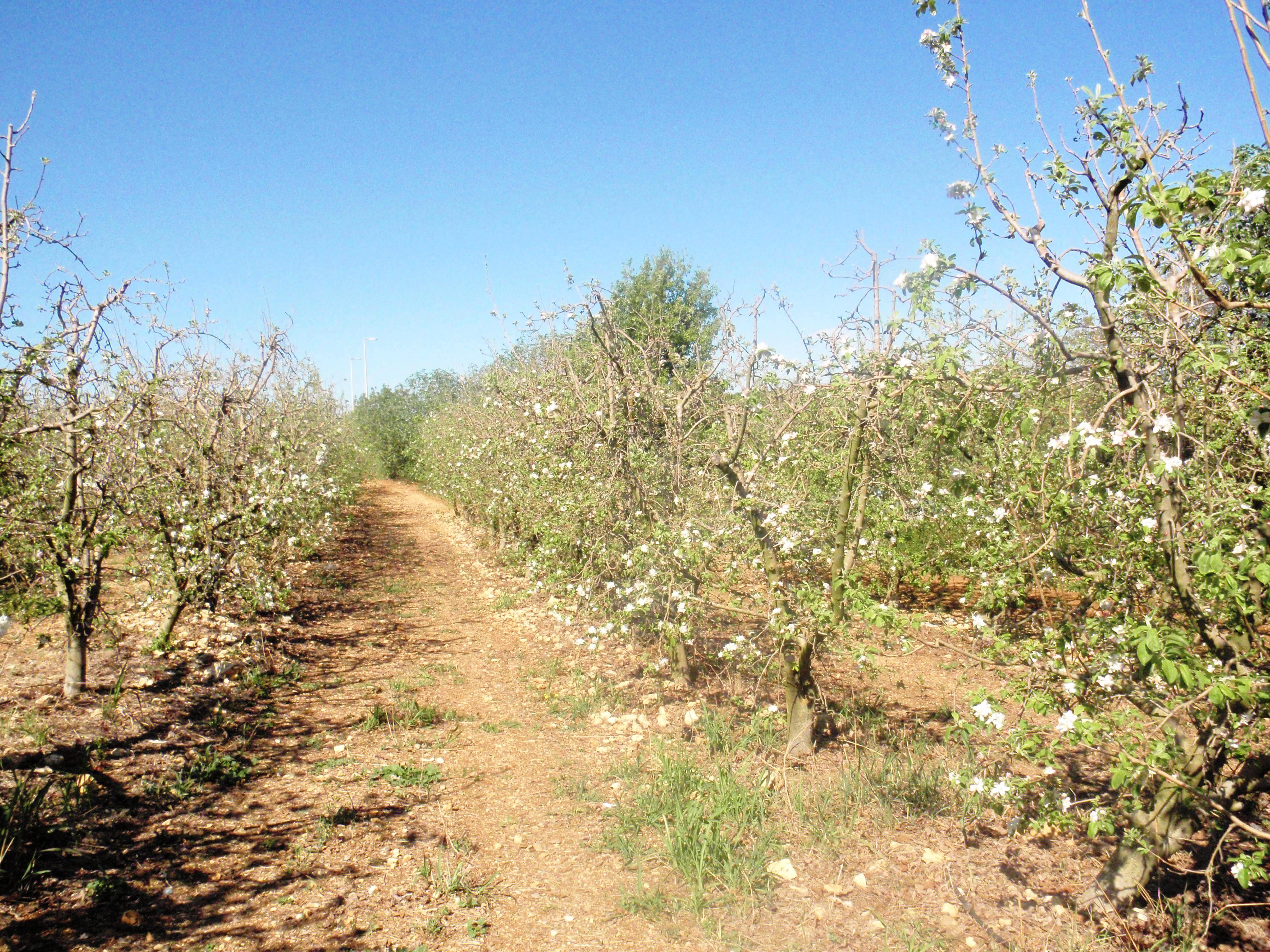 ענפים חקלאיים מושב דובב